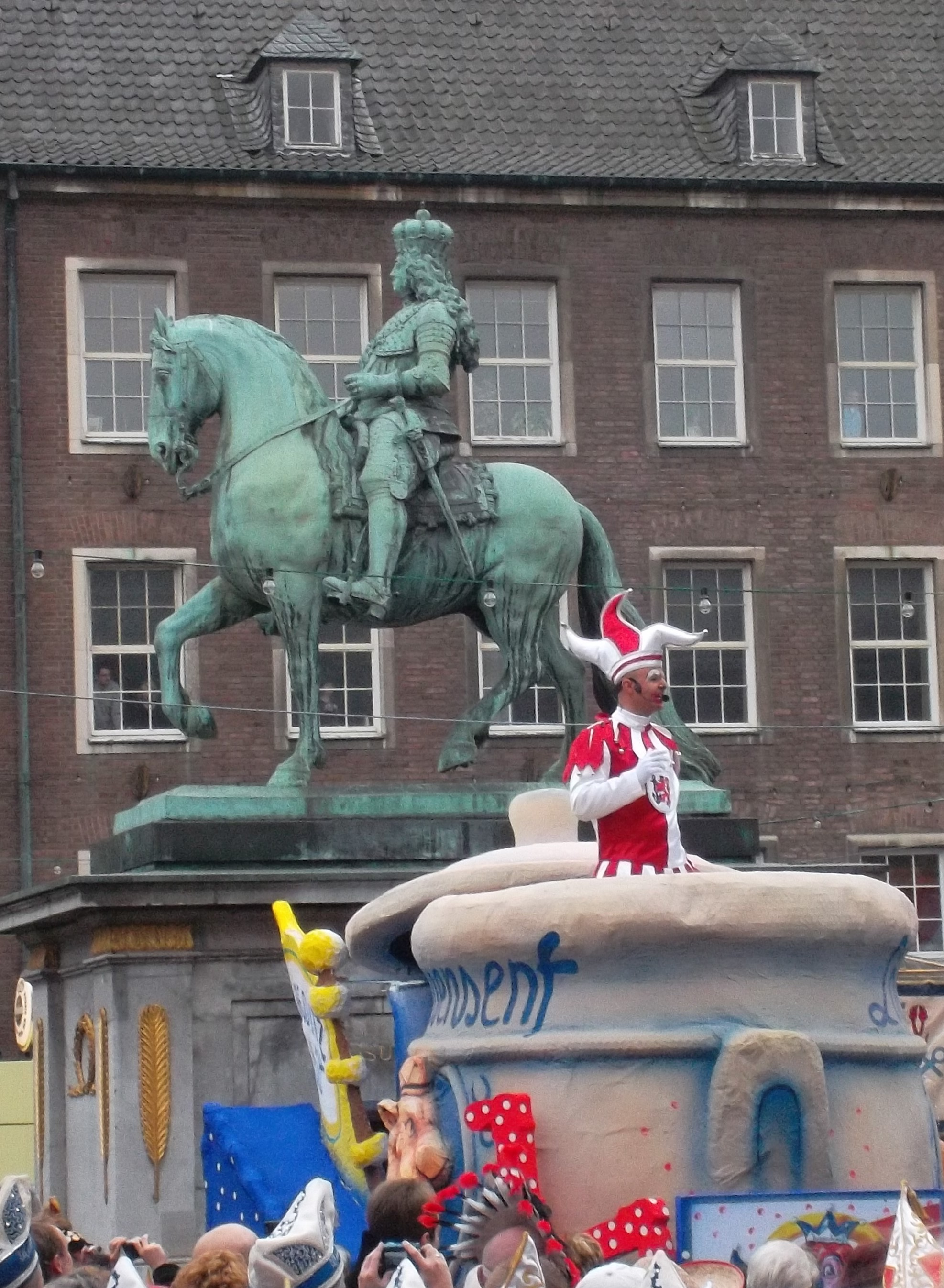 Hoppeditz-Erwachen Düsseldorf 11.11.11